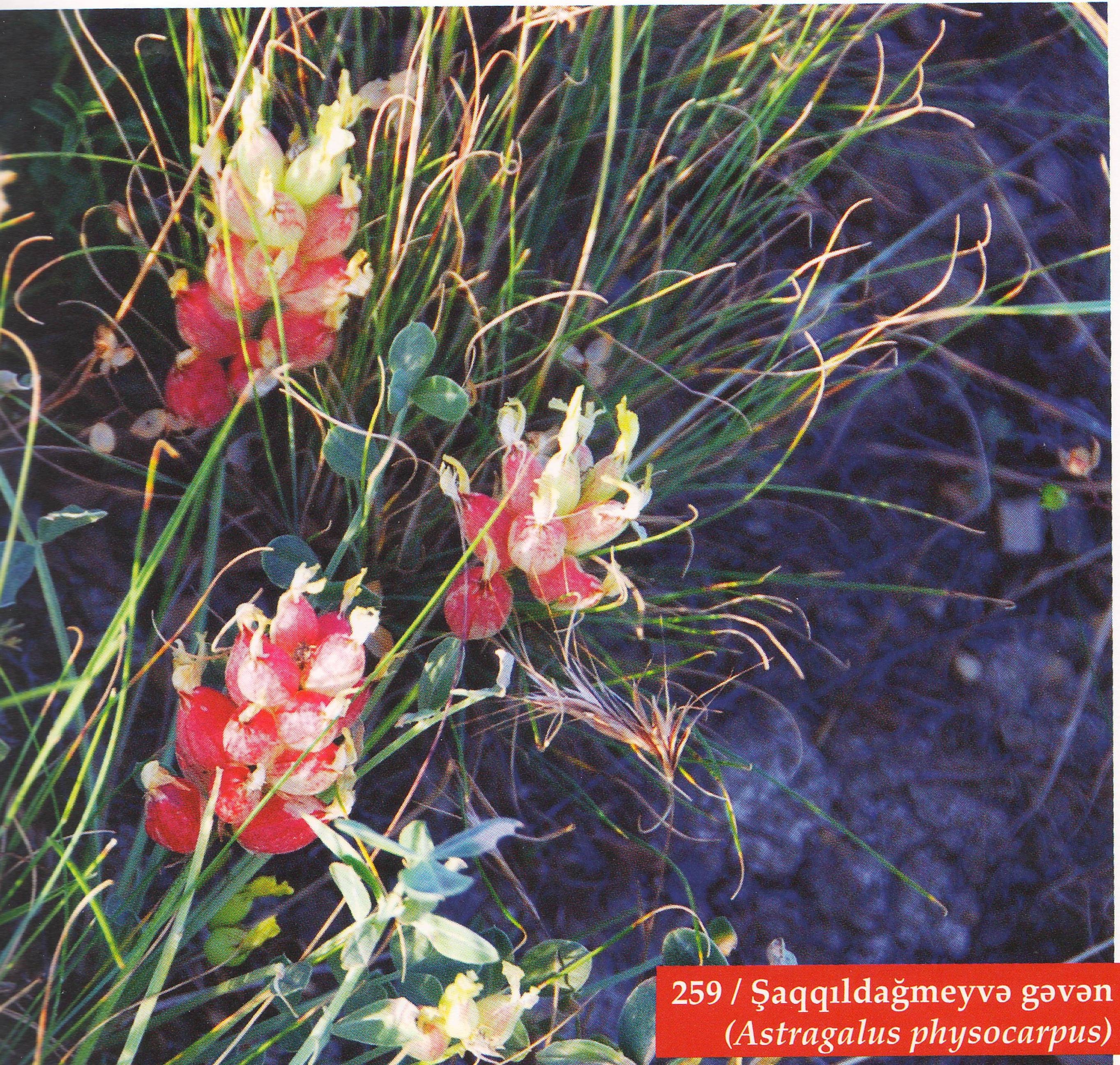 Beyləqan Şaqqıldağmeyvə gəvən